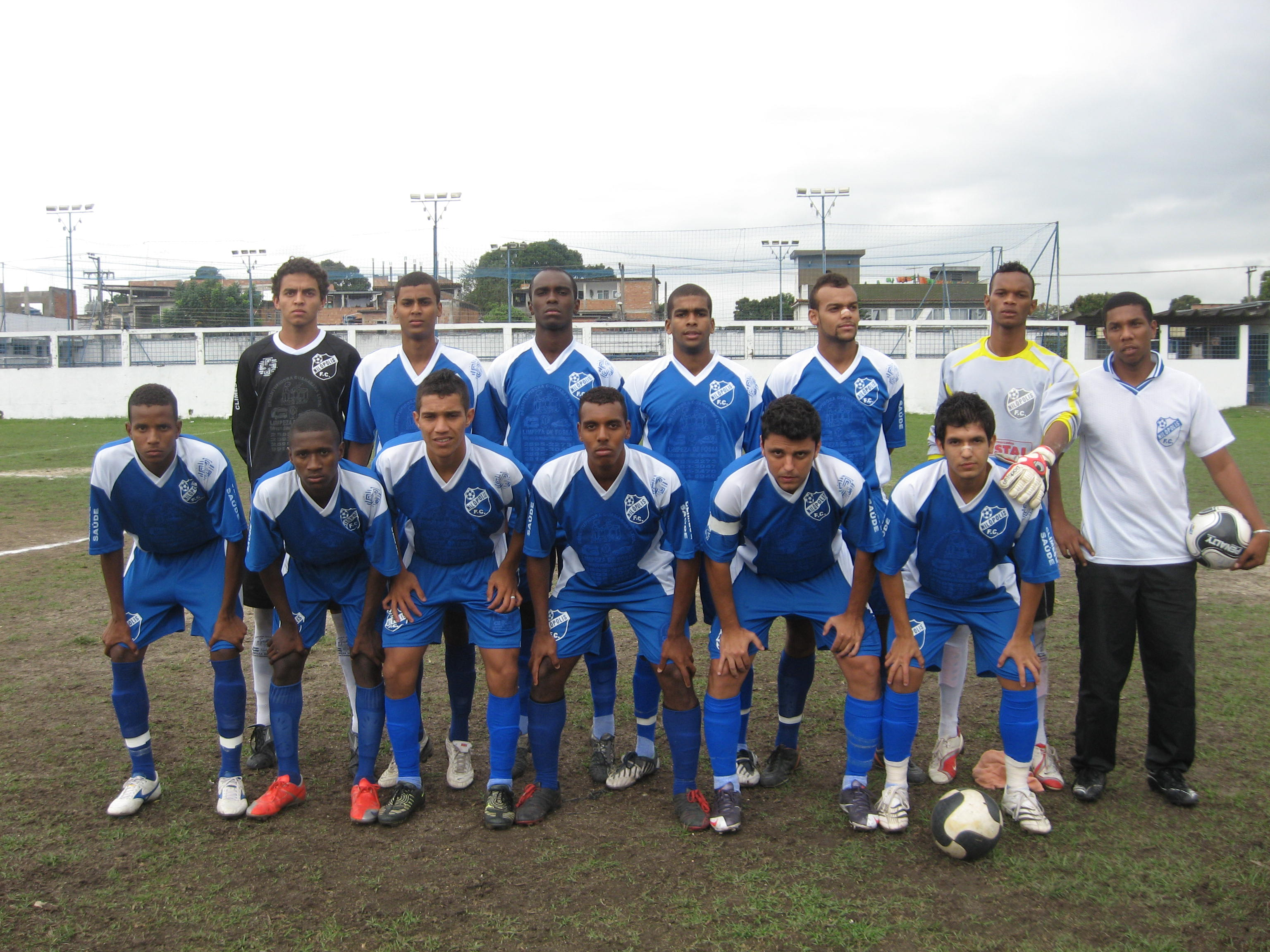 Equipe do Nilópolis Futebol Clube em 2009 perfilada